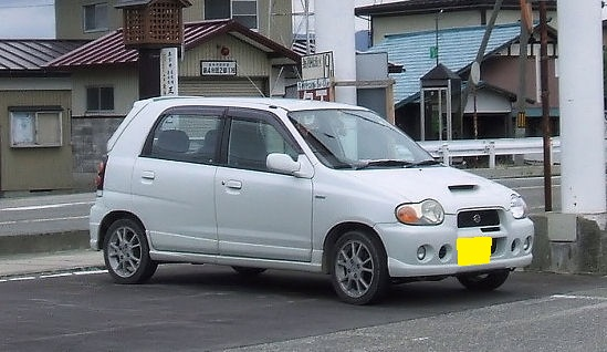 スズキ・アルト